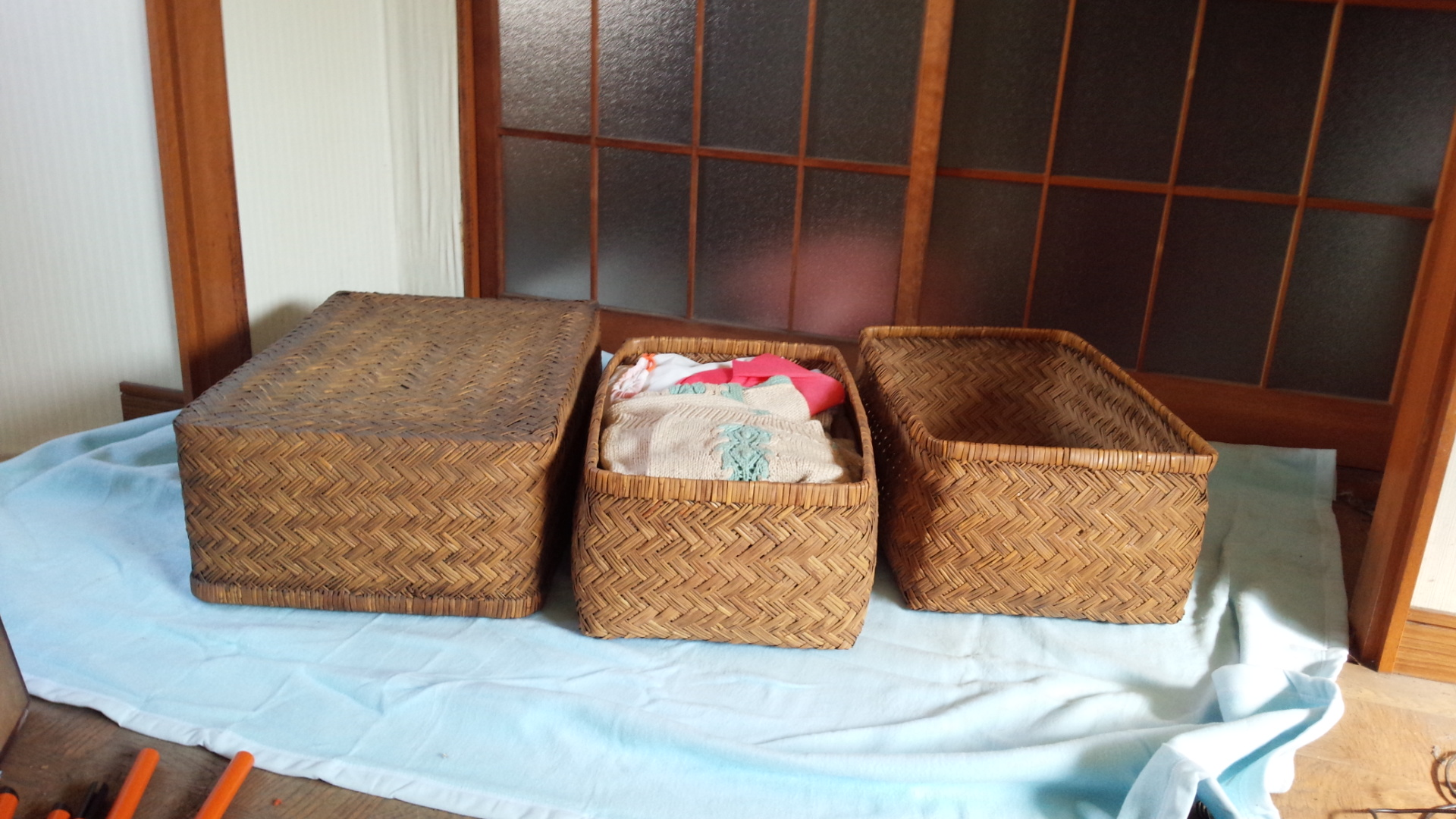 行李の画像